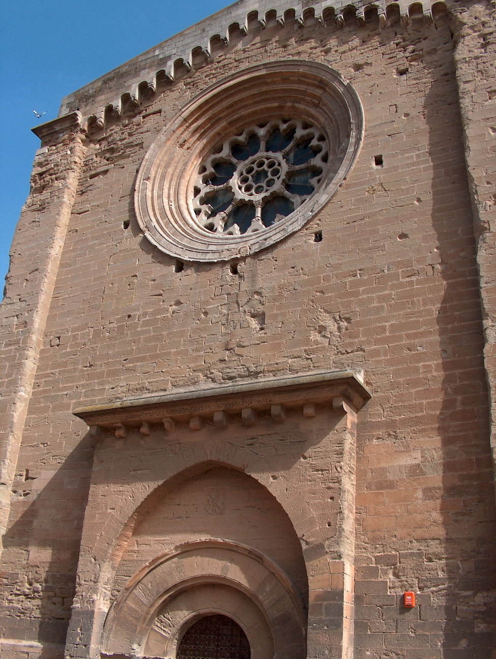 Sé Velha de Lérida. Sé Velha de Lérida em Espanha.